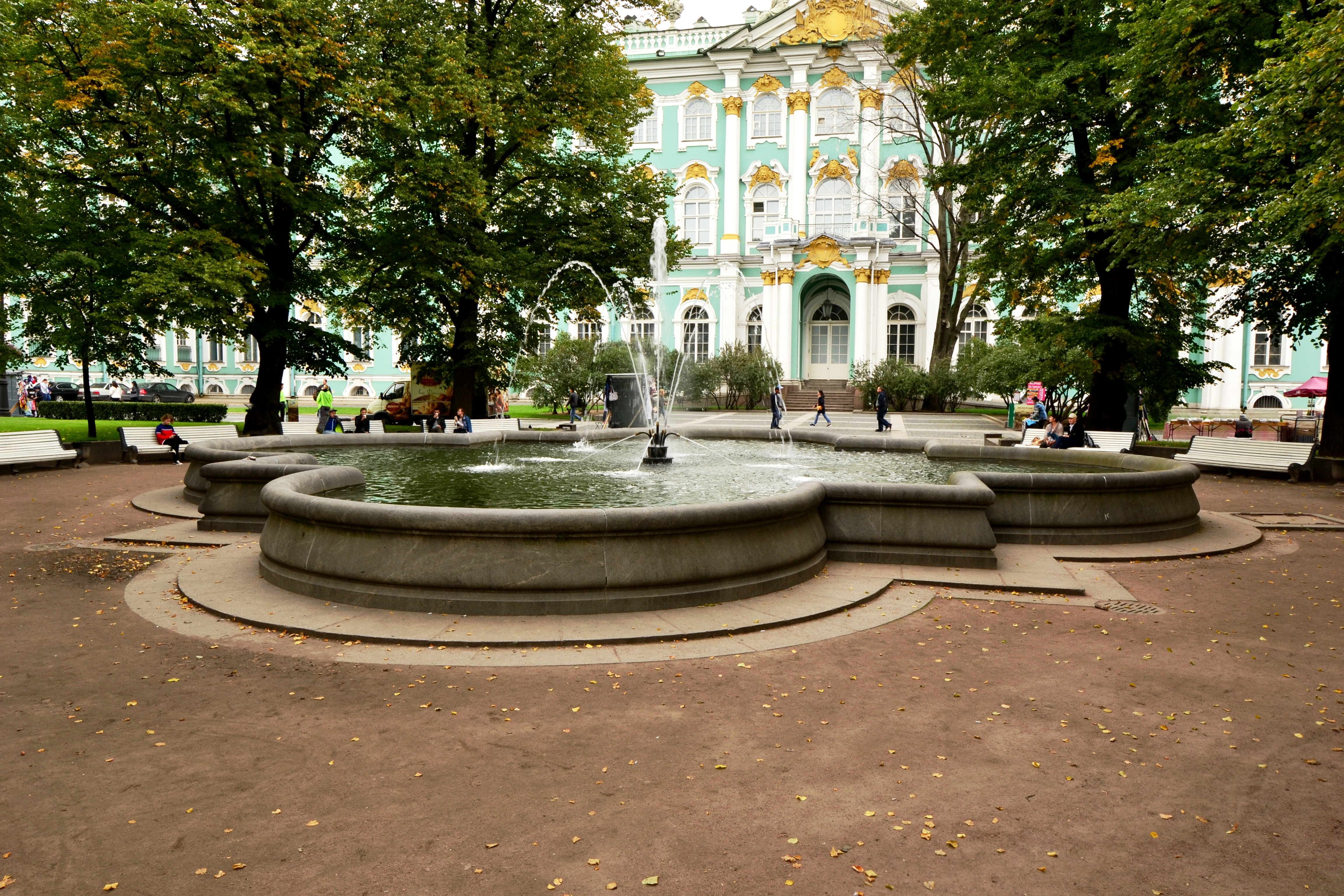 Сад, Санкт-Петербург